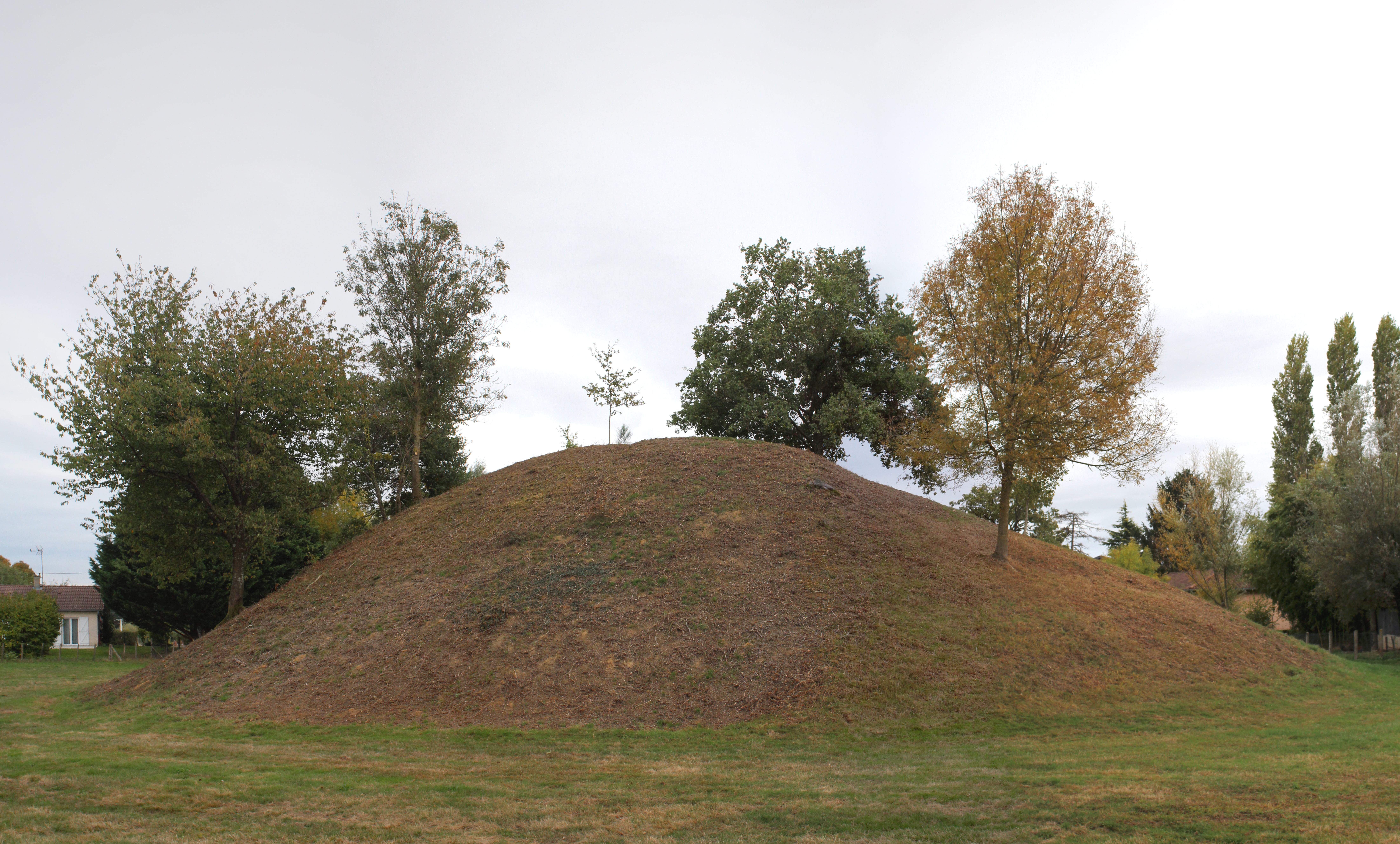 Poype de Saint-Cyr-sur-Menthon.